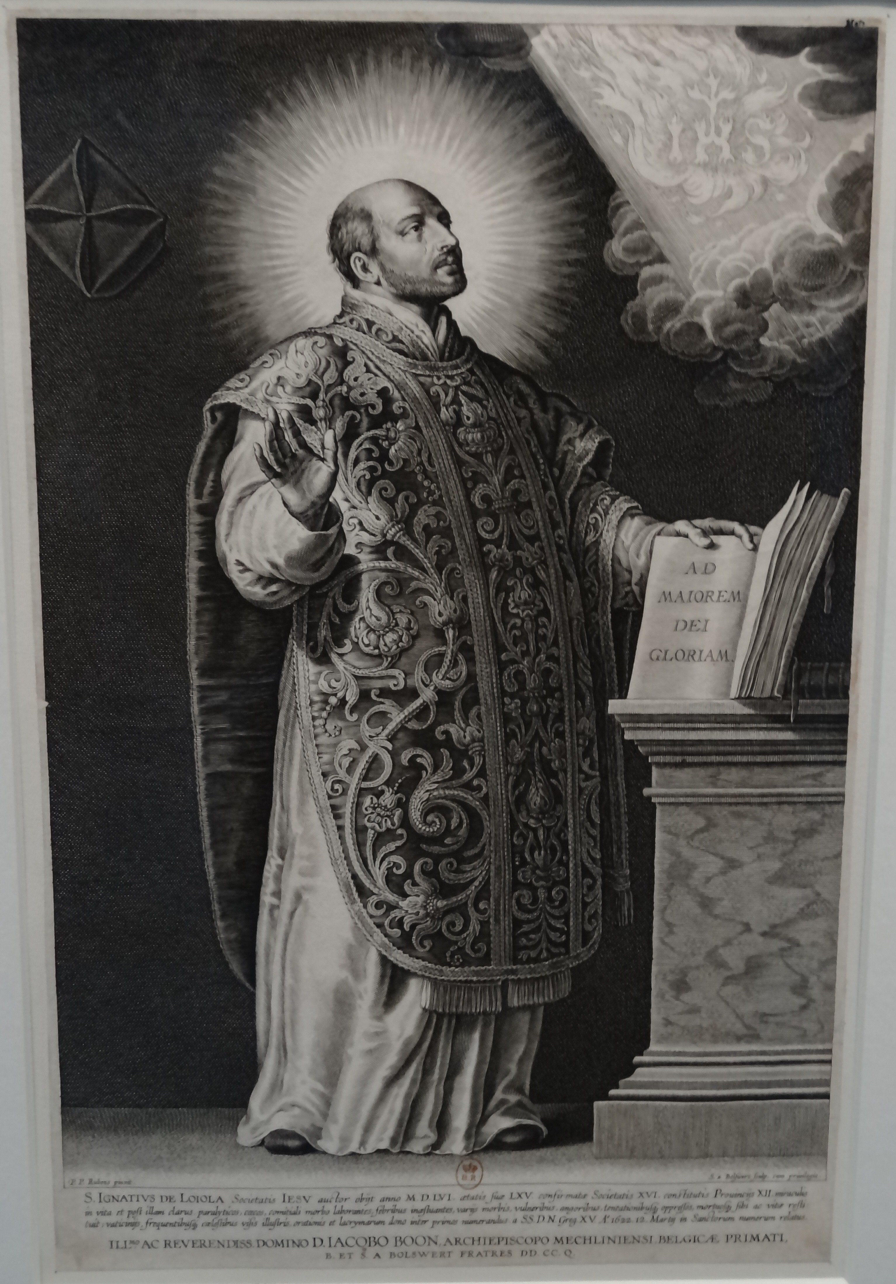 L'Europe de Rubens, Louvre-Lens, 22 May 2013-23 September 2013